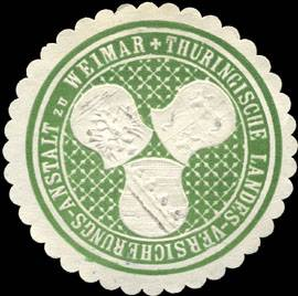 Sealing stamp Title: Thüringische Landes - Versicherungs - Anstalt zu Weimar Description: grün, weiß, geprägt Place: Weimar size: 4 cm